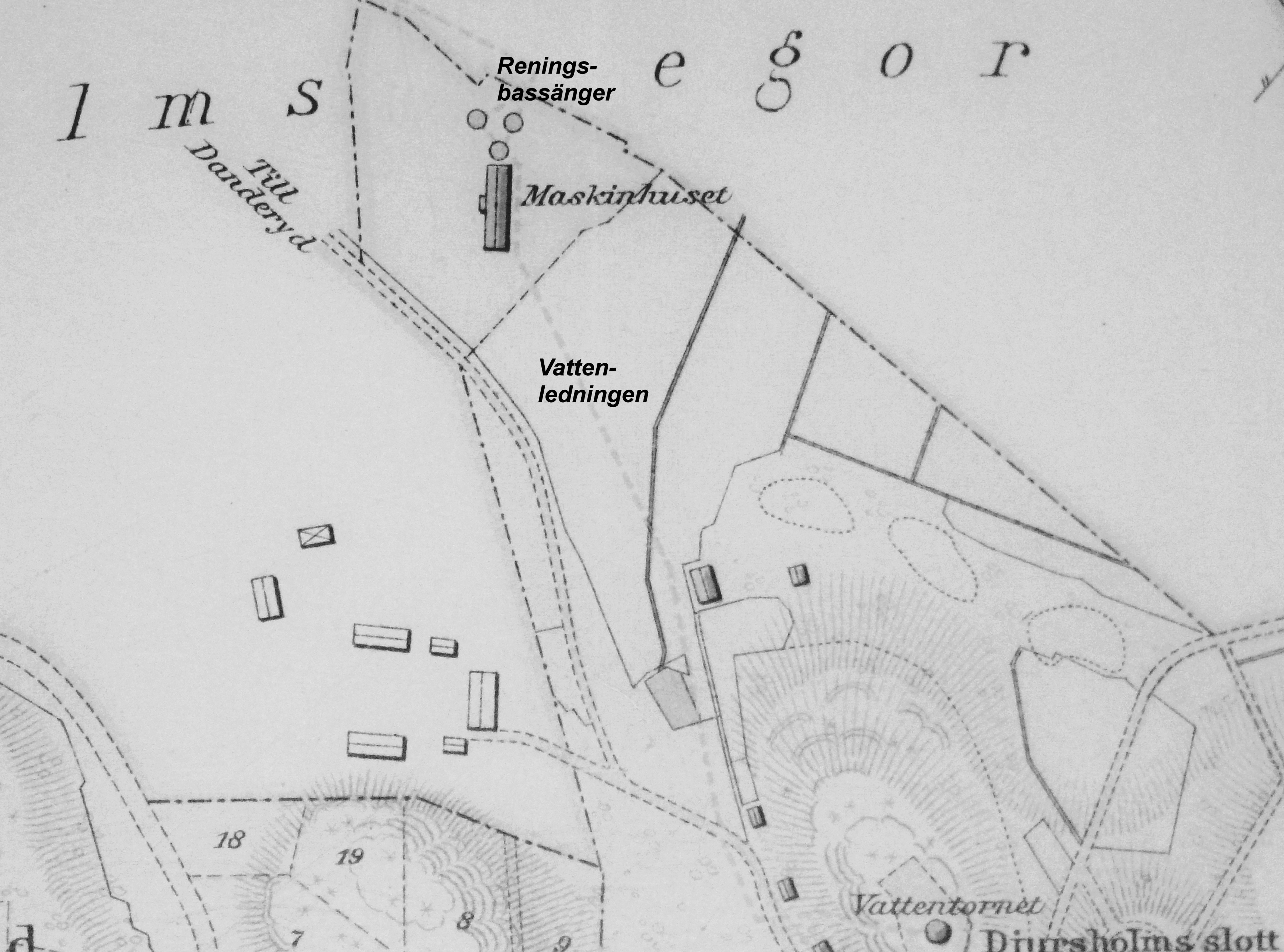 Djursholms maskinhus och vattenledning